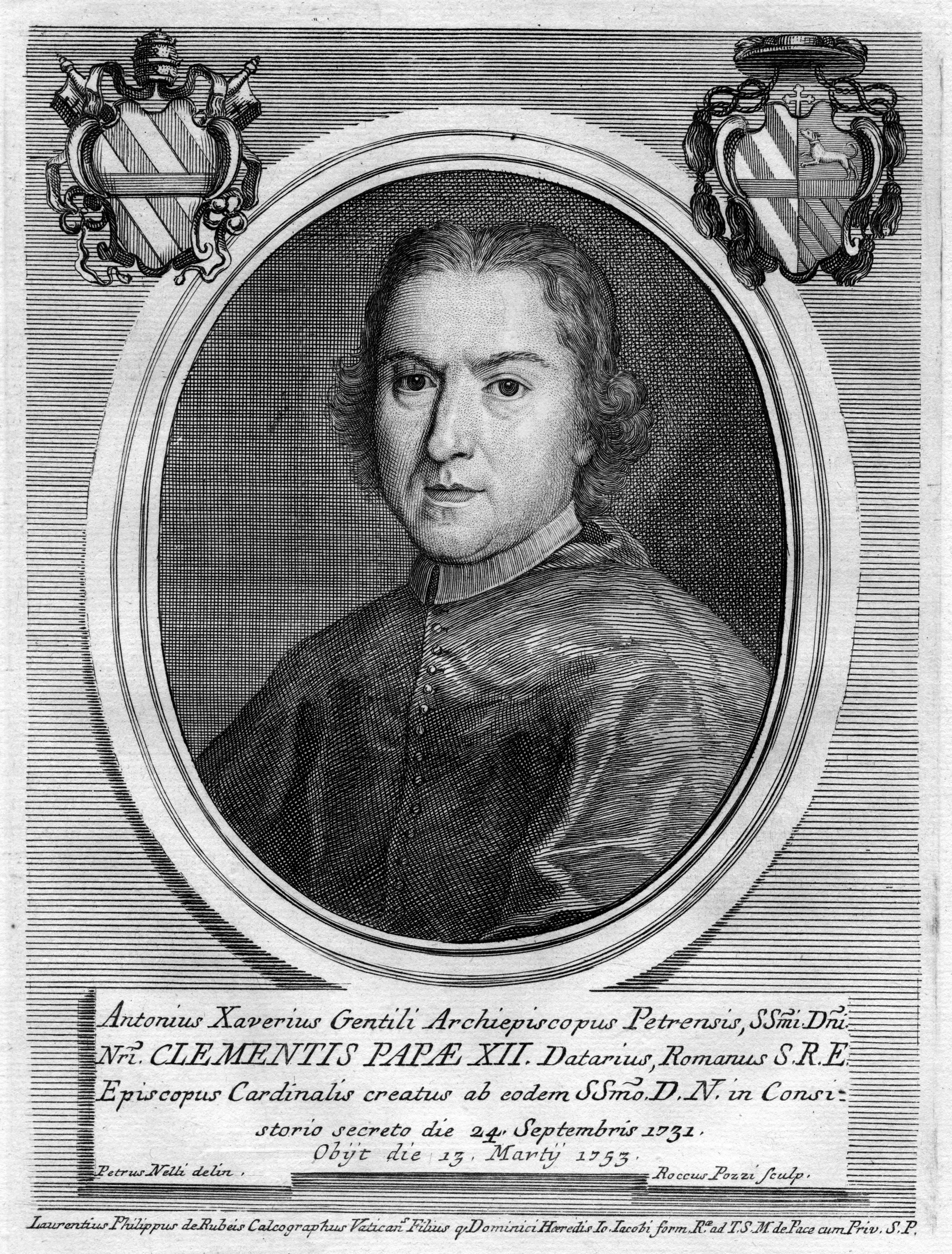 Portrait de Antonio Saverio Gentili (1681-1753)